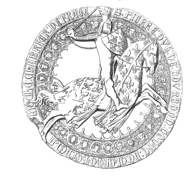 Pečeť petra I. Bourbonského